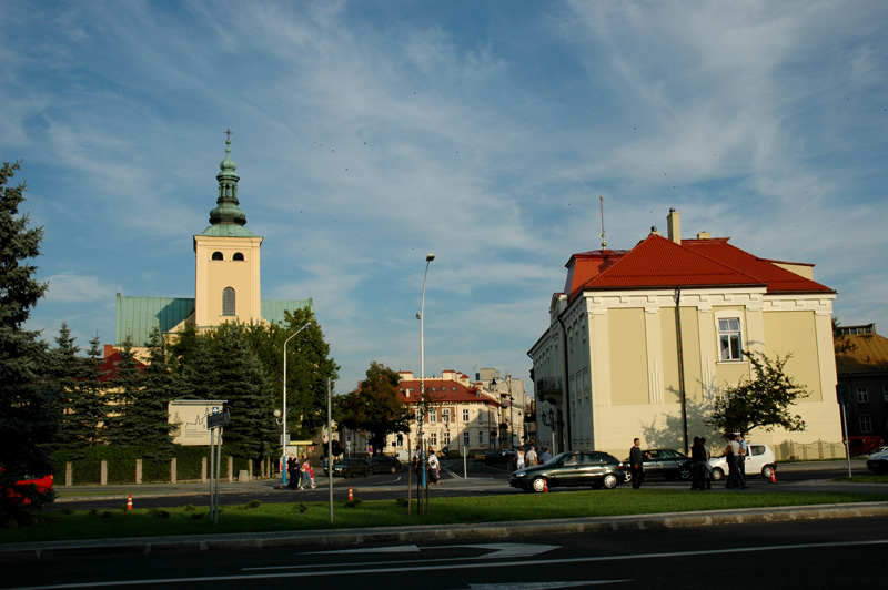 Main Library in Rzeszów